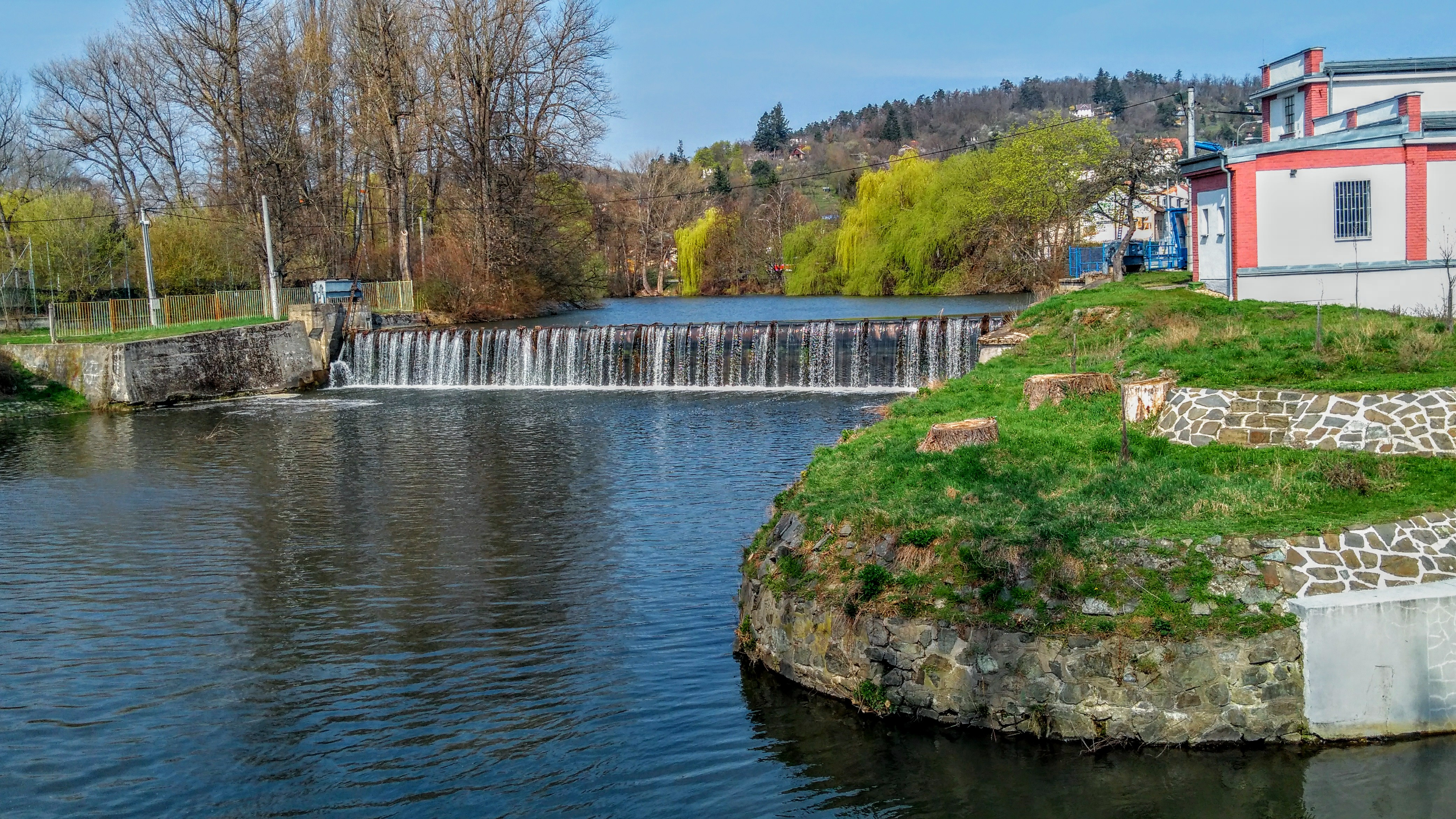 Jez na řece Svratce ve čtvrti Komín.